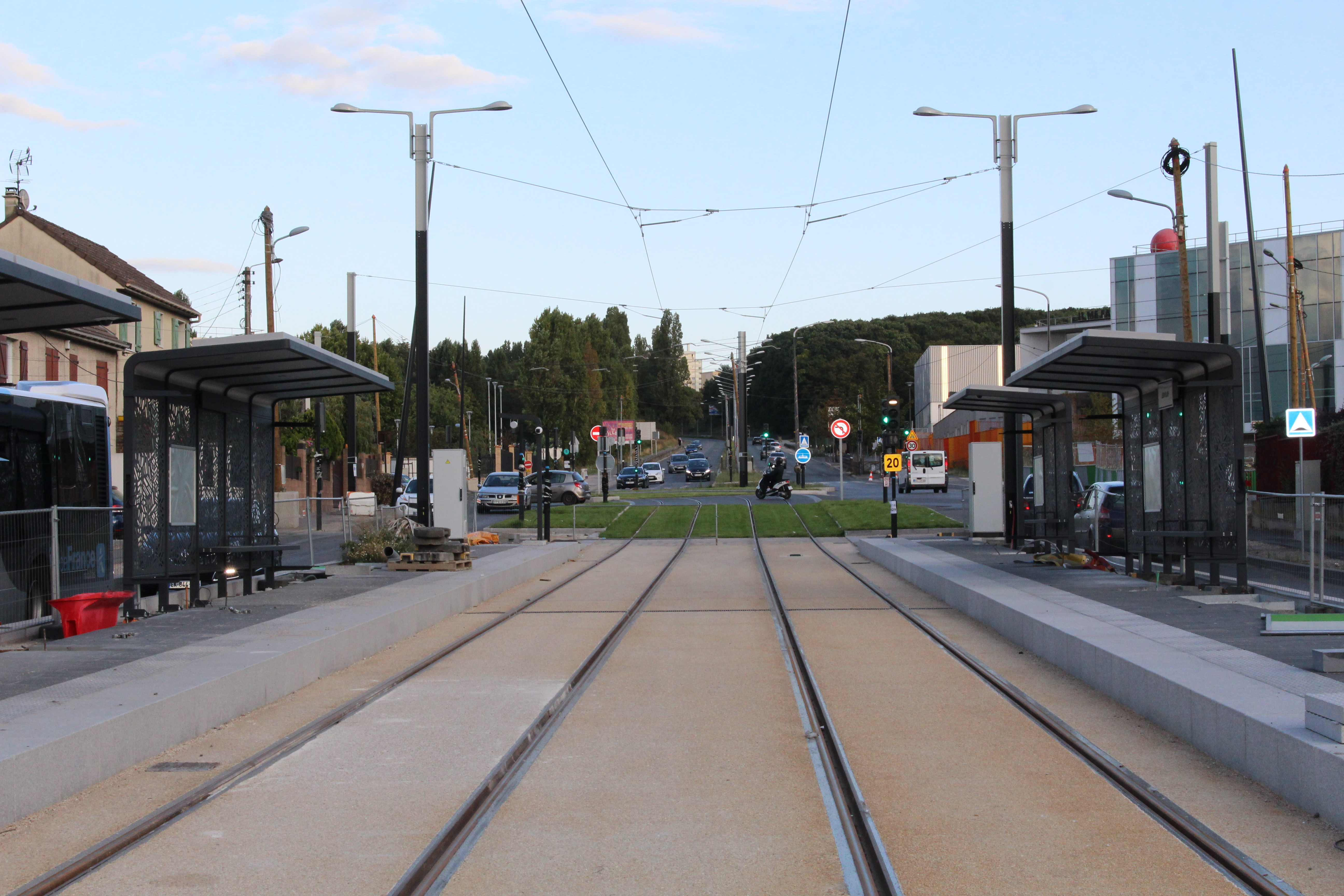 Station de tramway de la ligne 4 Léon Blum, Livry-Gargan.